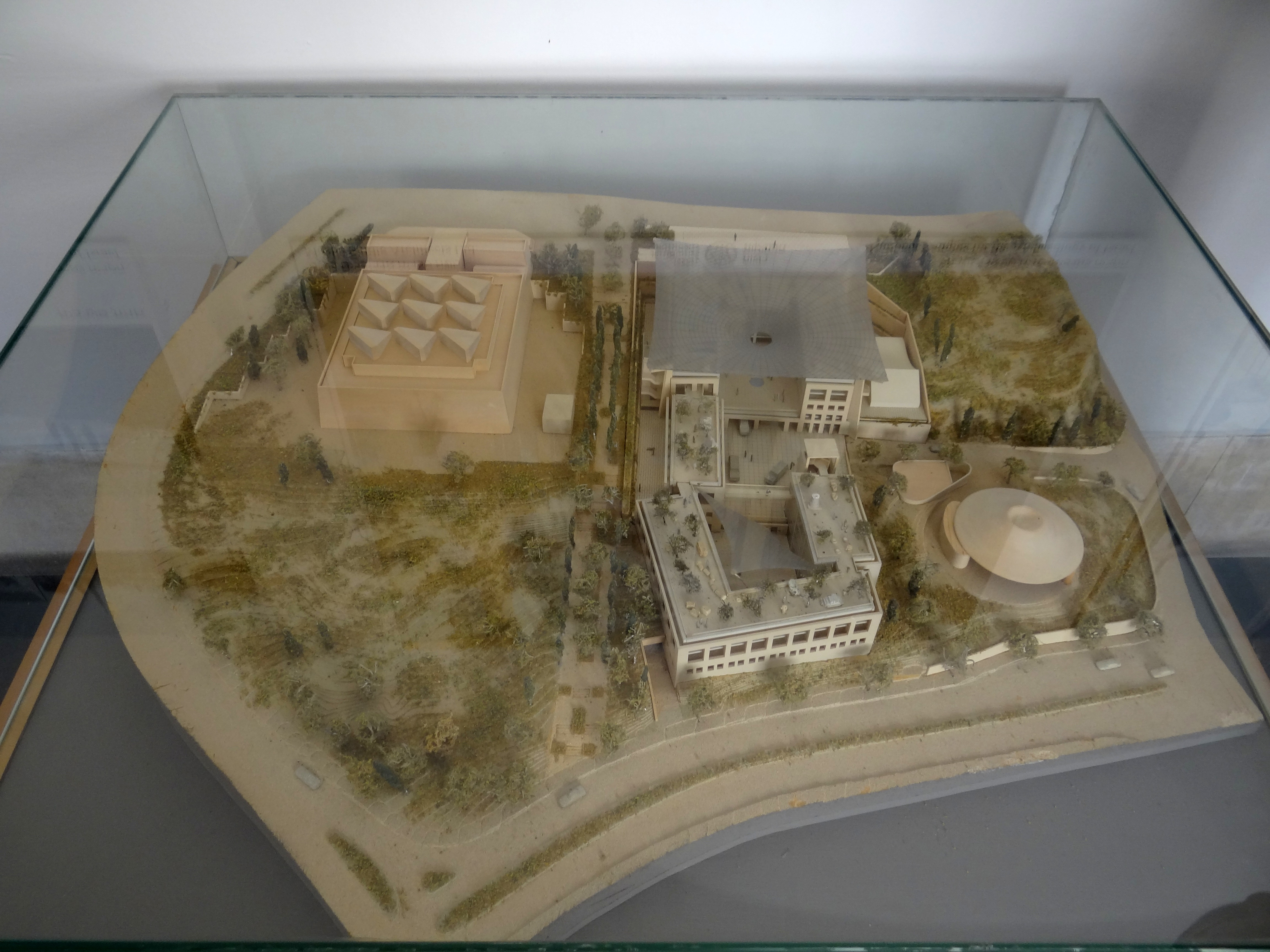 Program of the National Campus Archaeology of the Land of Israel דגם מבנה הקריה הלאומית לארכאולוגיה של ארץ ישראל המוצב במסדרון ליד חדר הישיבות העגול במשרדי רשות העתיקות במזיאון רוקפלר